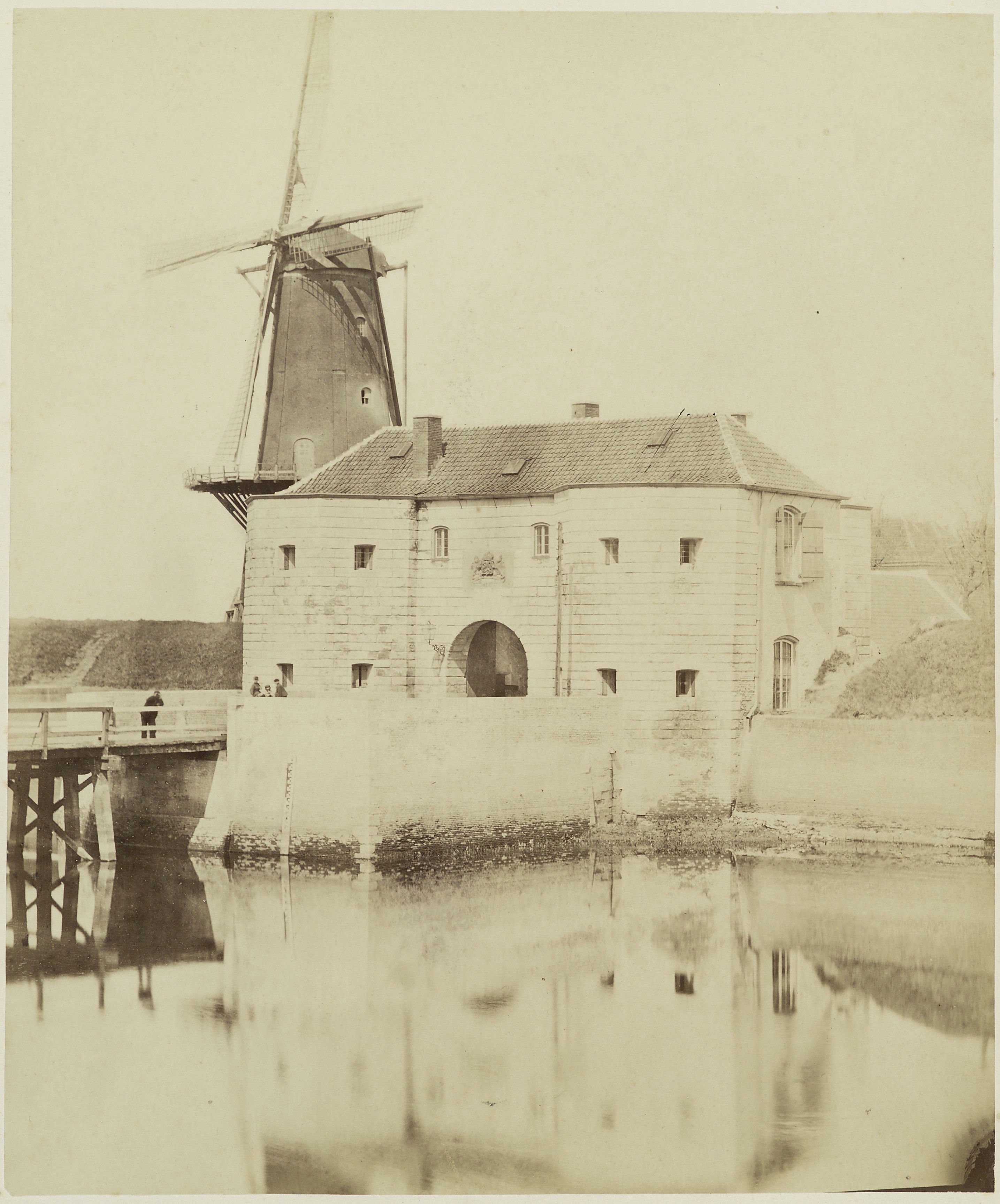 Vuchterpoort/ Molen van Van Esch: Vughterpoort en stellingmolen op bastion (opmerking: Op achterzijde schoonschrift)